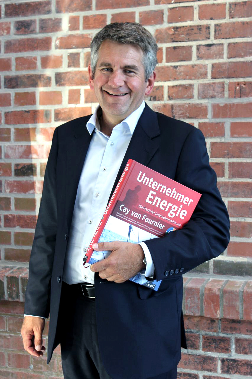 Der Autor, Arzt, Unternehmer und Vortragsredner Cay von Fournier